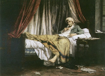 Marat, olio su tela, Vizille, Musée